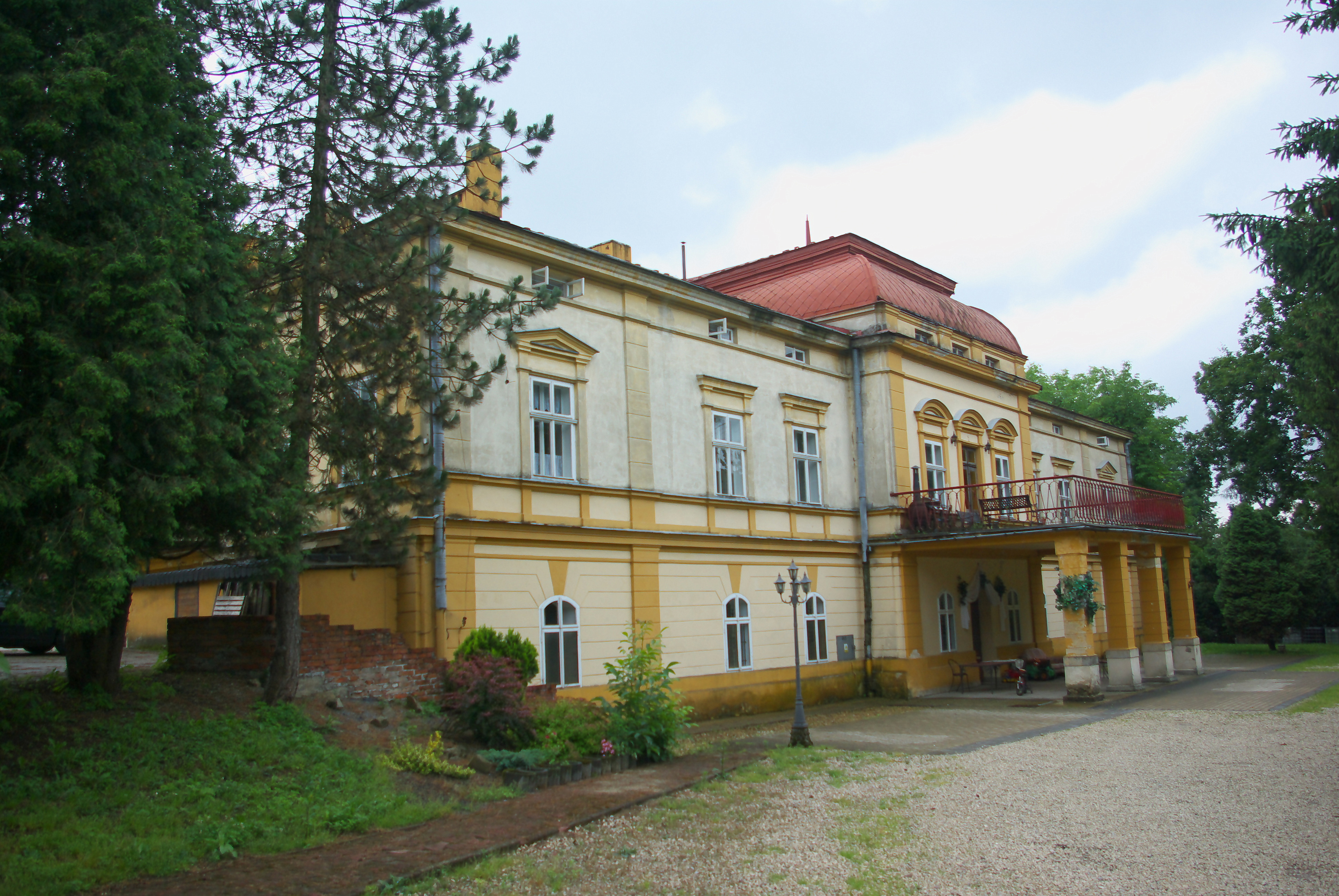 Pałac w Grabownicy Starzeńskiej (2018).